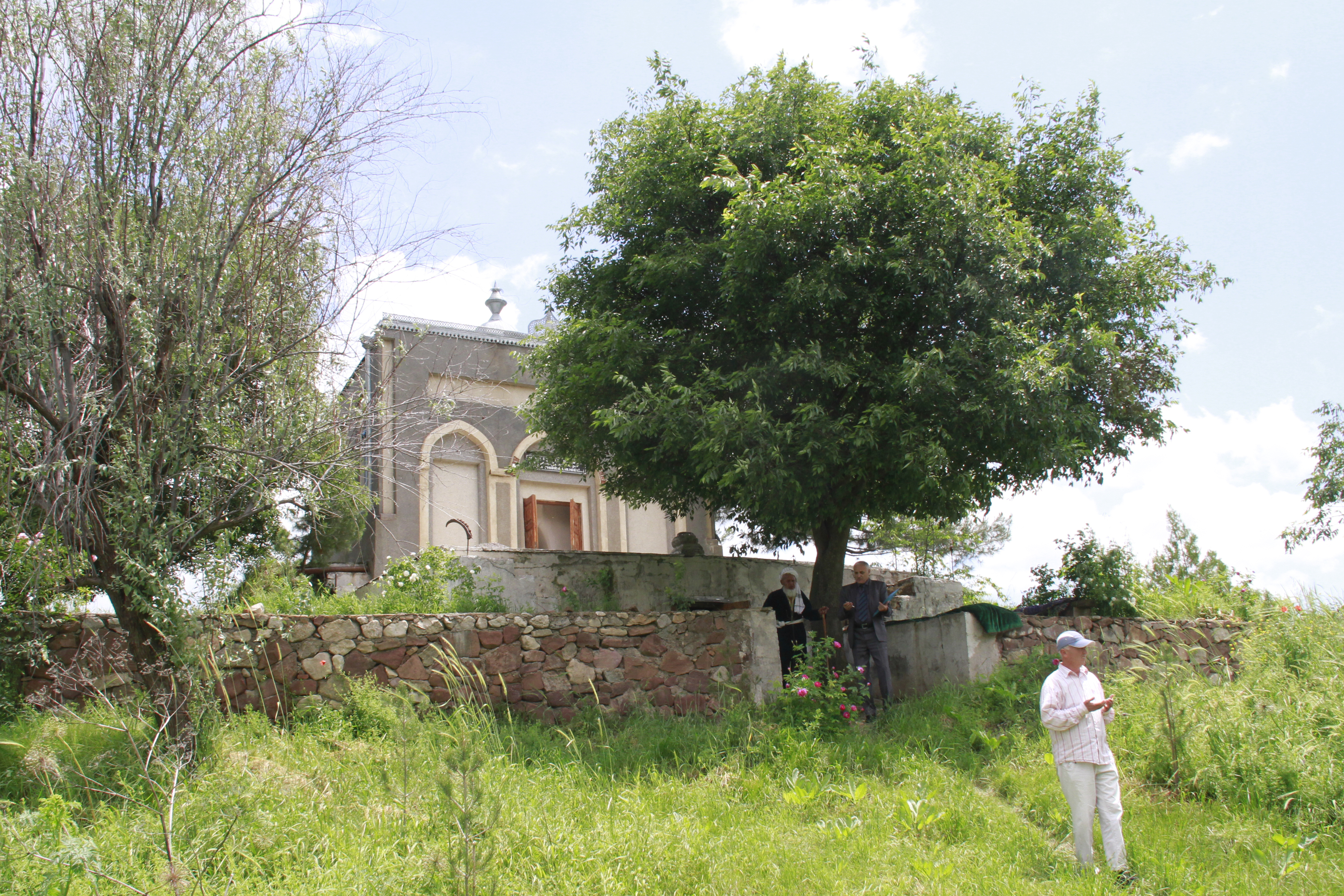 Тоҷикӣ: Оромгоҳи Шақиқи Балхӣ дар мавзеи Себистони ноҳияи Данғара